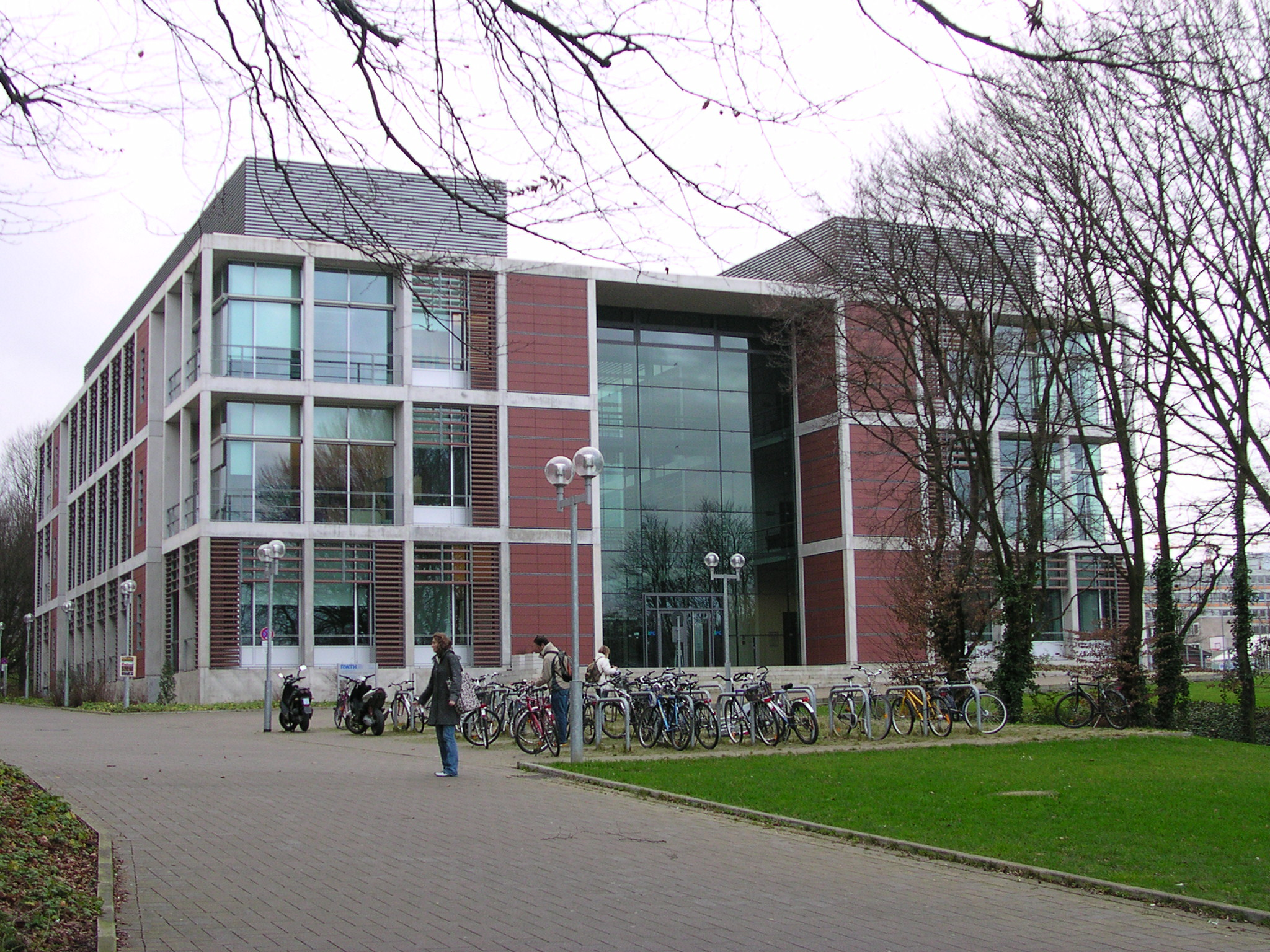 RWTH Aachen, Institut für Physikalische Chemie, nach Entwurf des Büros Gerkan, Marg und Partner